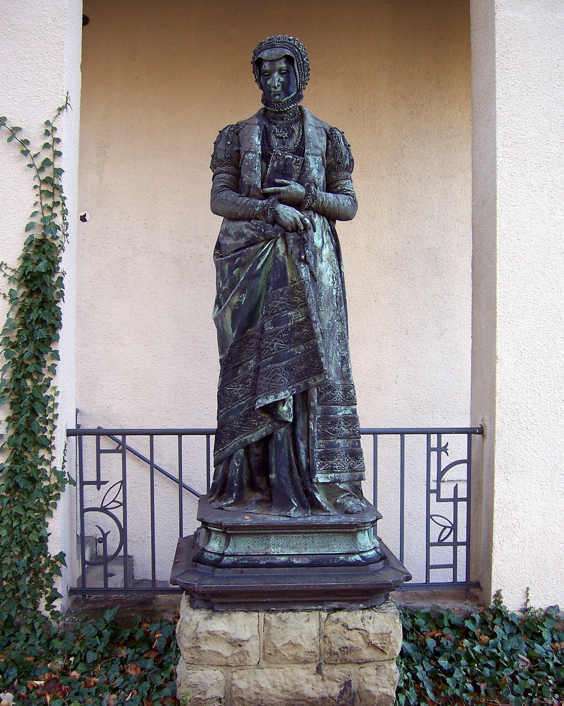 Das Annendenkmal auf dem Alten Annenfriedhof an der Chemnitzer Straße in Dresden zeigt die Kurfürstin von Sachsen, Anna von Dänemark und Norwegen (1532–1585). Es wurde 1869 von Robert Henze geschaffen und vor der Annenkirche am Freiberger Platz aufgestellt. Die Annenkirche wurde im Jahre 1578 erbaut, 1760 im Siebenjährigen Krieg zerstört, bis 1769 neu erbaut und brannte 1945 bei der Bombardierung Dresdens aus. 1992 bis 2010 wurde die gesamte Kirche generalsaniert. Die Statue hatte nach 1945 ihren Standplatz auf dem Alten Annenfriedhof (siehe Abbildung). Seit dem 20. Mai 2011 steht die restaurierte Bronzestatue wieder an ihrem ehemaligen Standort vor der restaurierten Annenkirche. Die Herstellung erfolgte in der Kunst- und Glockengießerei C. Albert Bierling in Dresden.